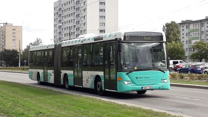 17. bussiliin sõitmas mööda Sõpruse puiesteed